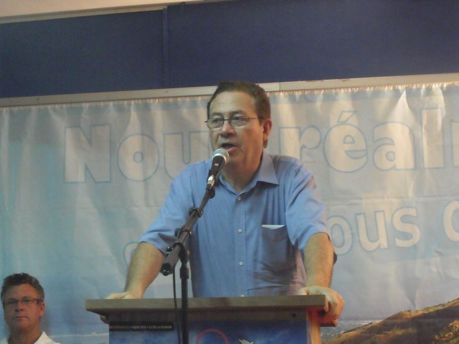 Photographie de claude Hoarau, Maire de Saint Louis de La Réunion lors d'un meeting de l'Alliance pour les élections régionale du dimanche 21 mars 2010.